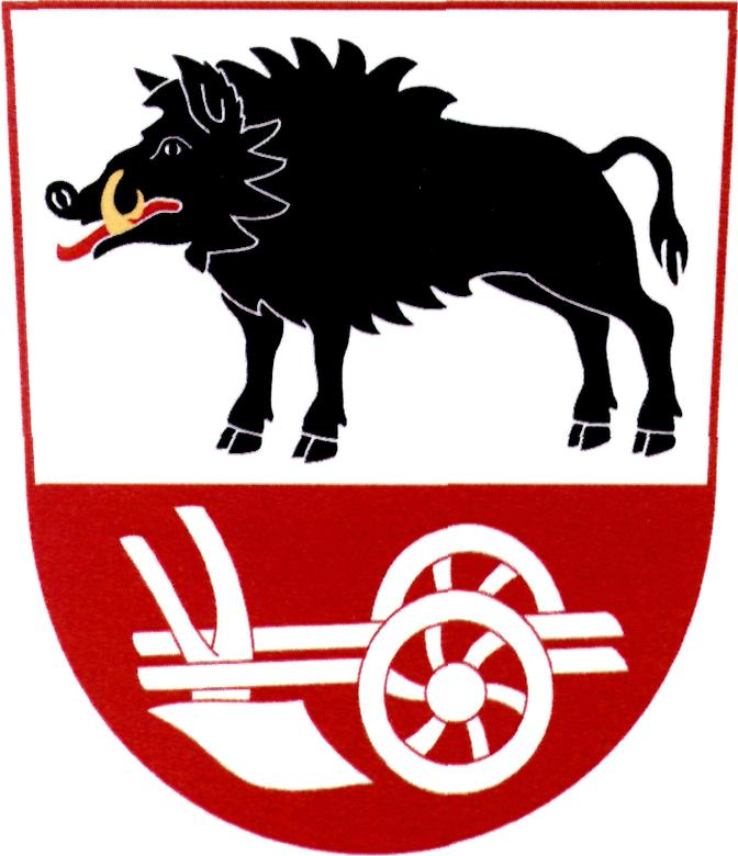 Znak obce Vepříkov